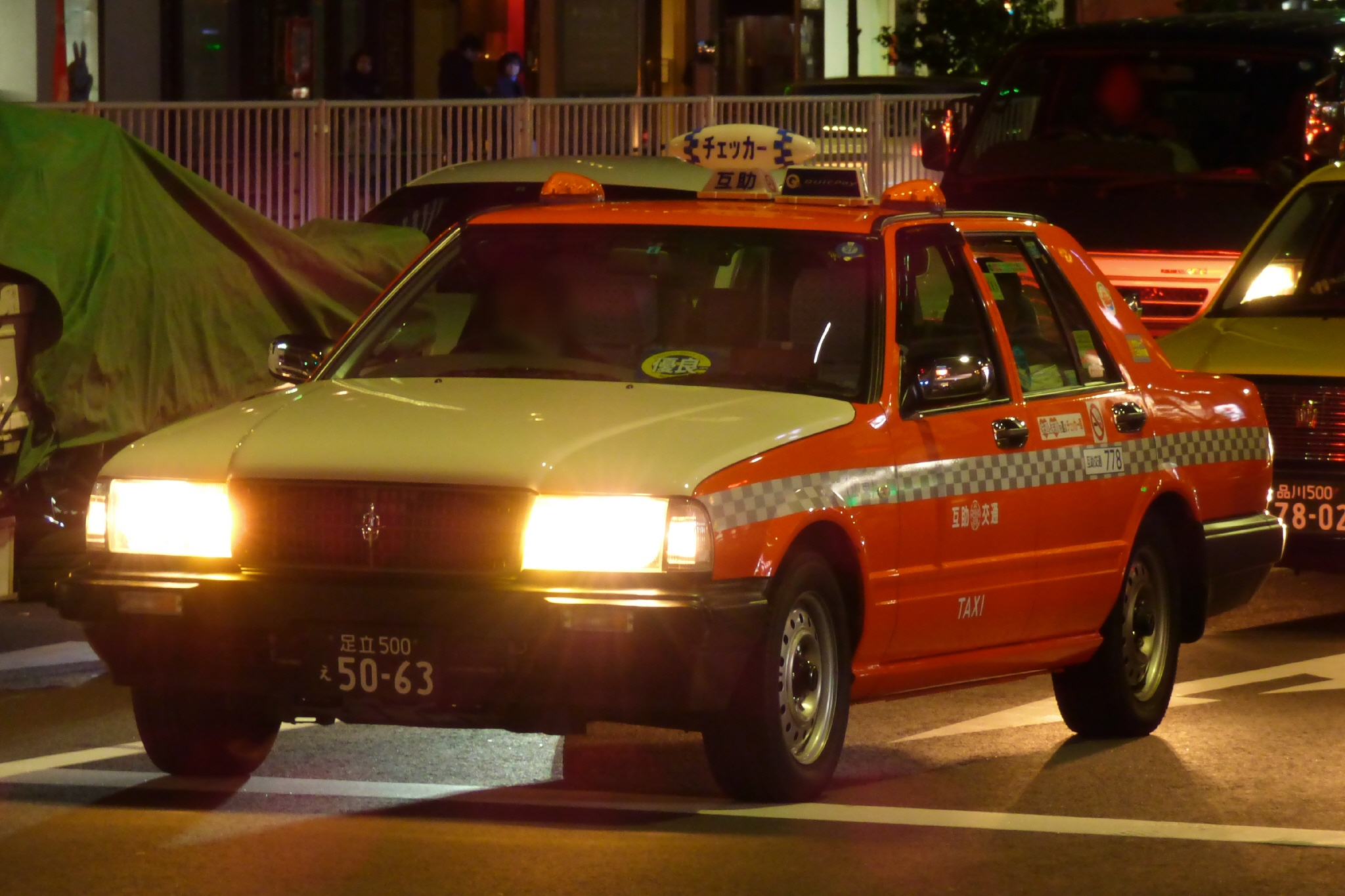 互助交通(チェッカーキャブ加盟)の日産・セドリック営業車